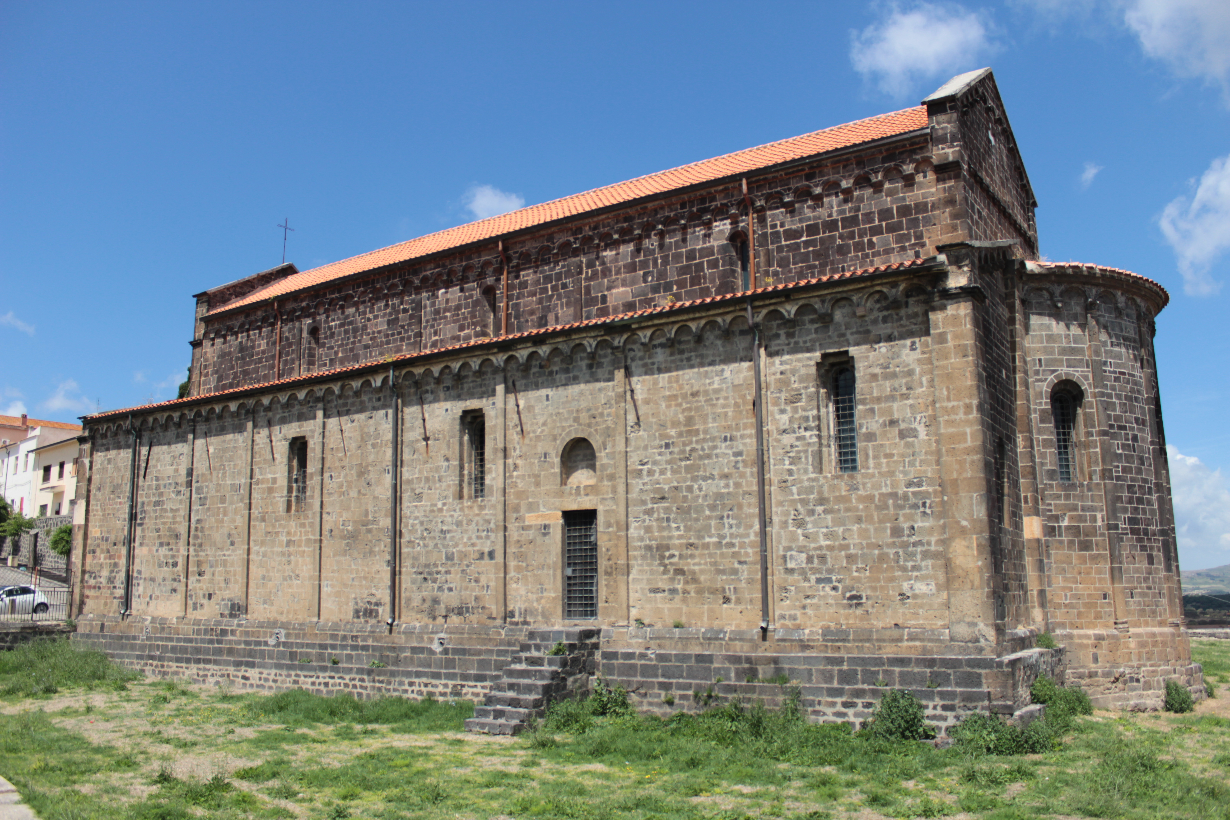 Église Santa Maria del Regno a Ardara en Sardaigne vue de l’arrière